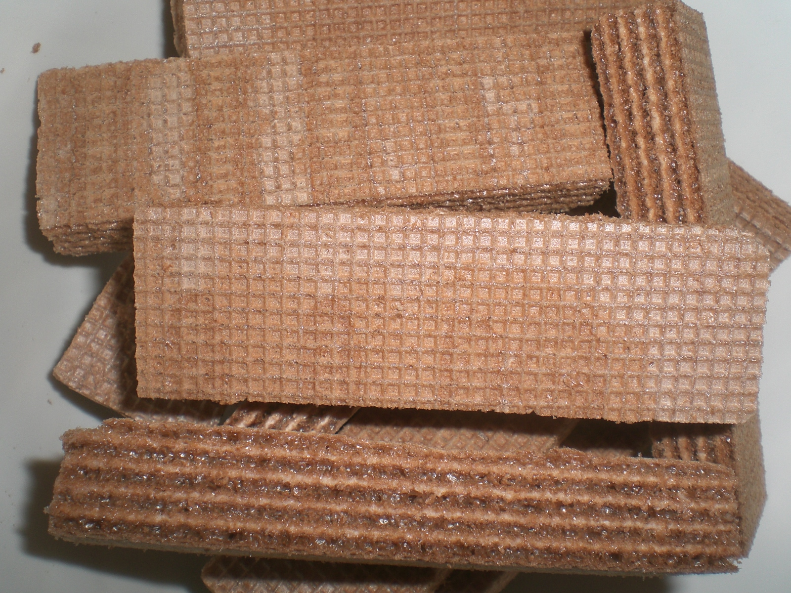 朱古力zh:威化餅